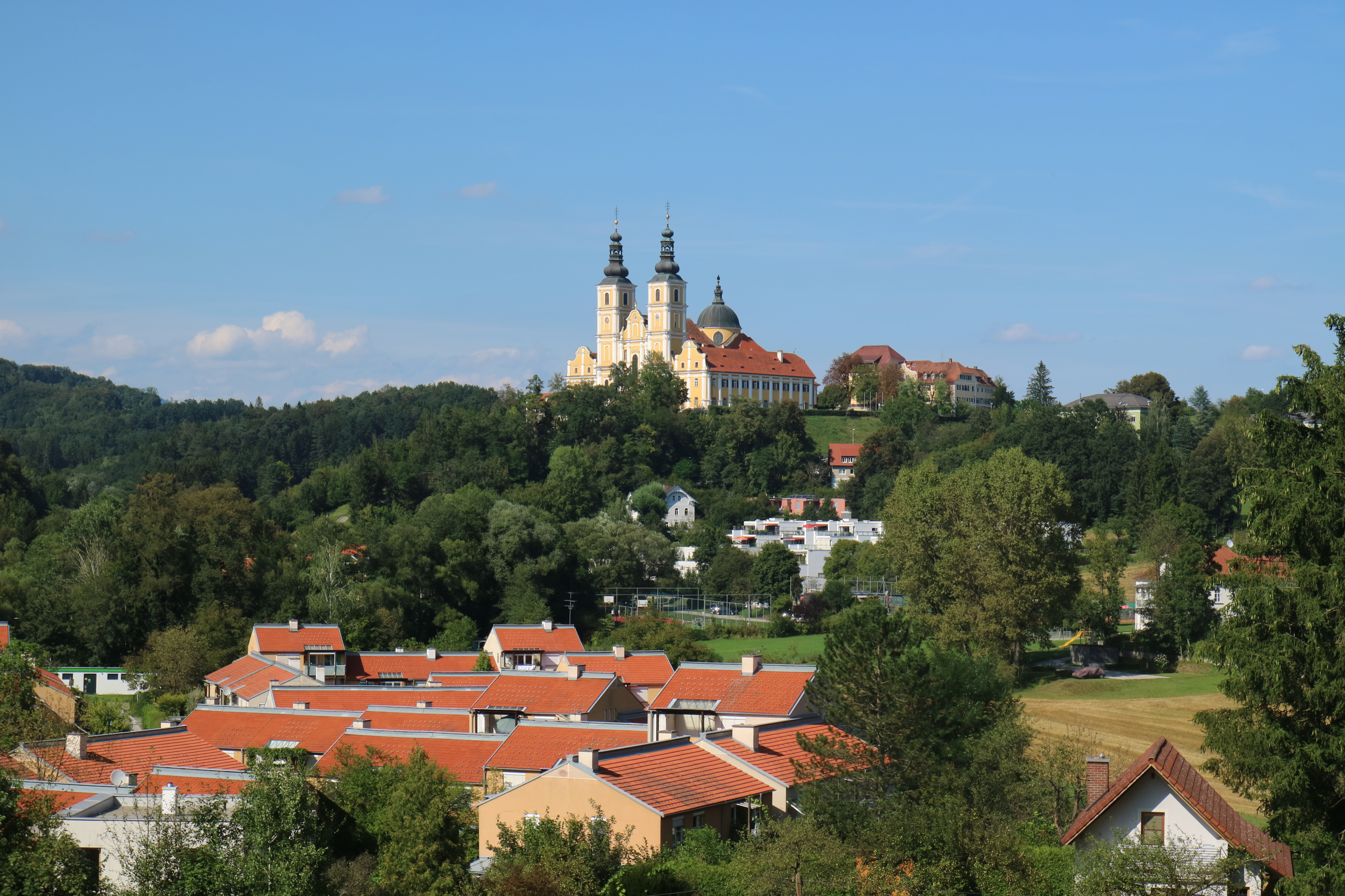 Blick vom Teichhof zur Basilika Mariatrost am Purberg, Graz